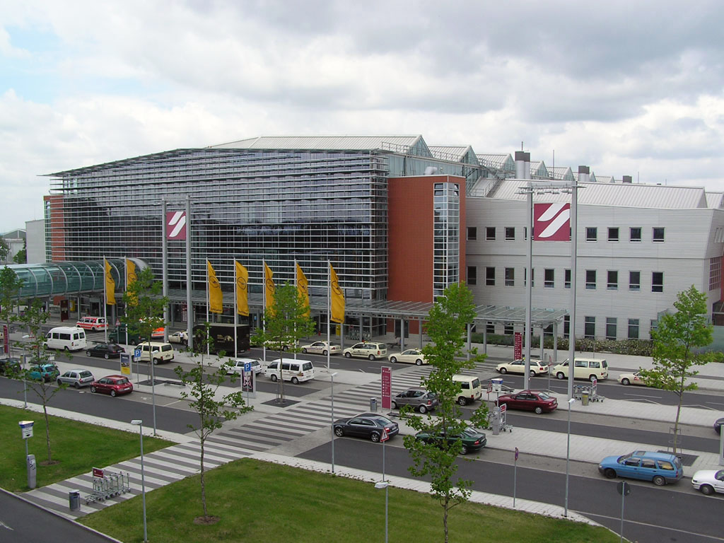 Das moderne Terminal des Flughafen Dresden-Klotzsche. Dieses Bild wurde vom Parkhaus aus gemacht.